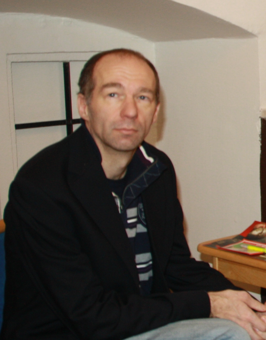 Ron Heusdens Euroopa võistkondlikel meistrivõistlustel rahvusvahelises kabes.